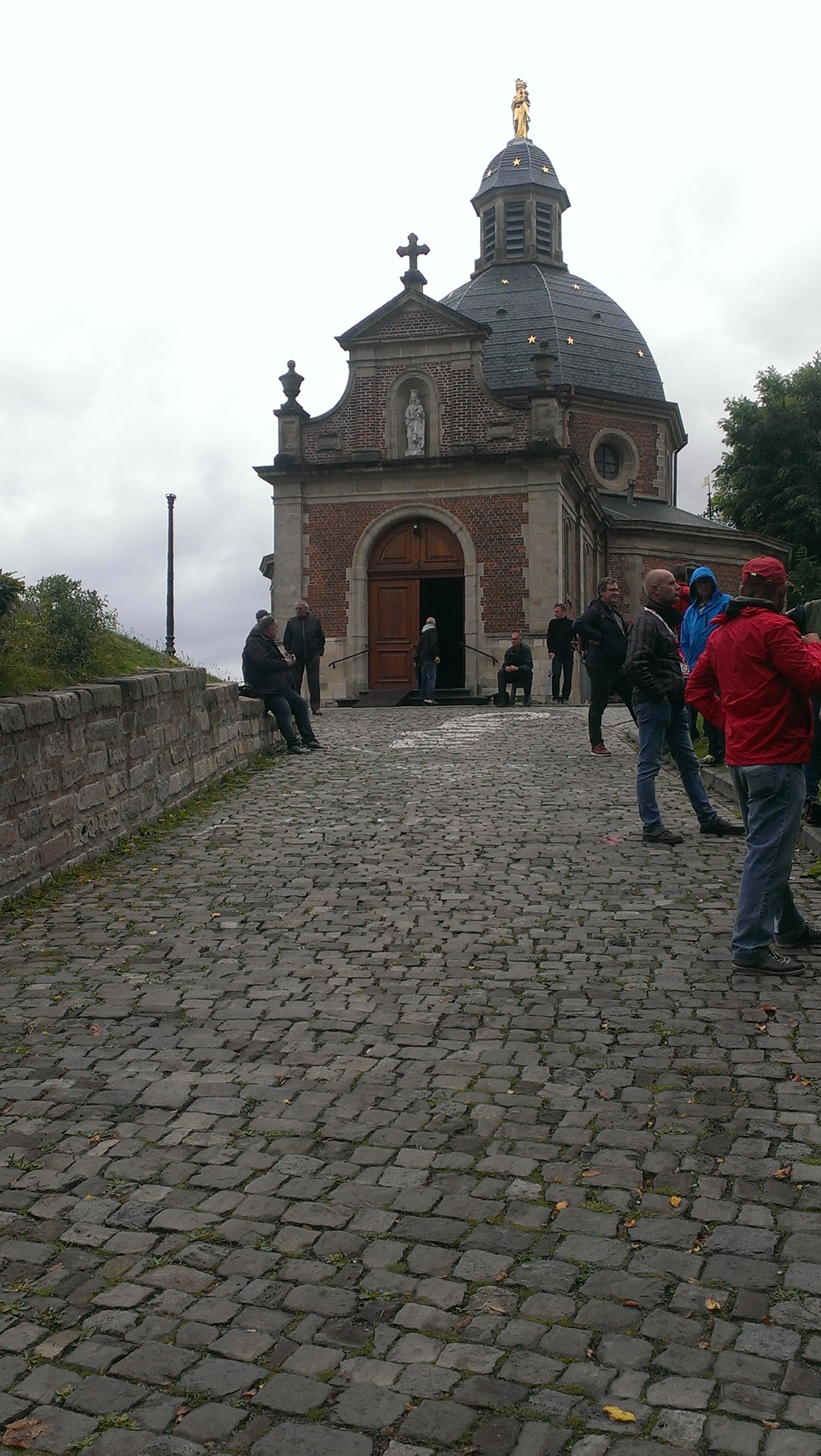 3e en laatste etappe van de Lotto Belgium Tour 2017 op de Muur / Kapelmuur van Geraardsbergen.